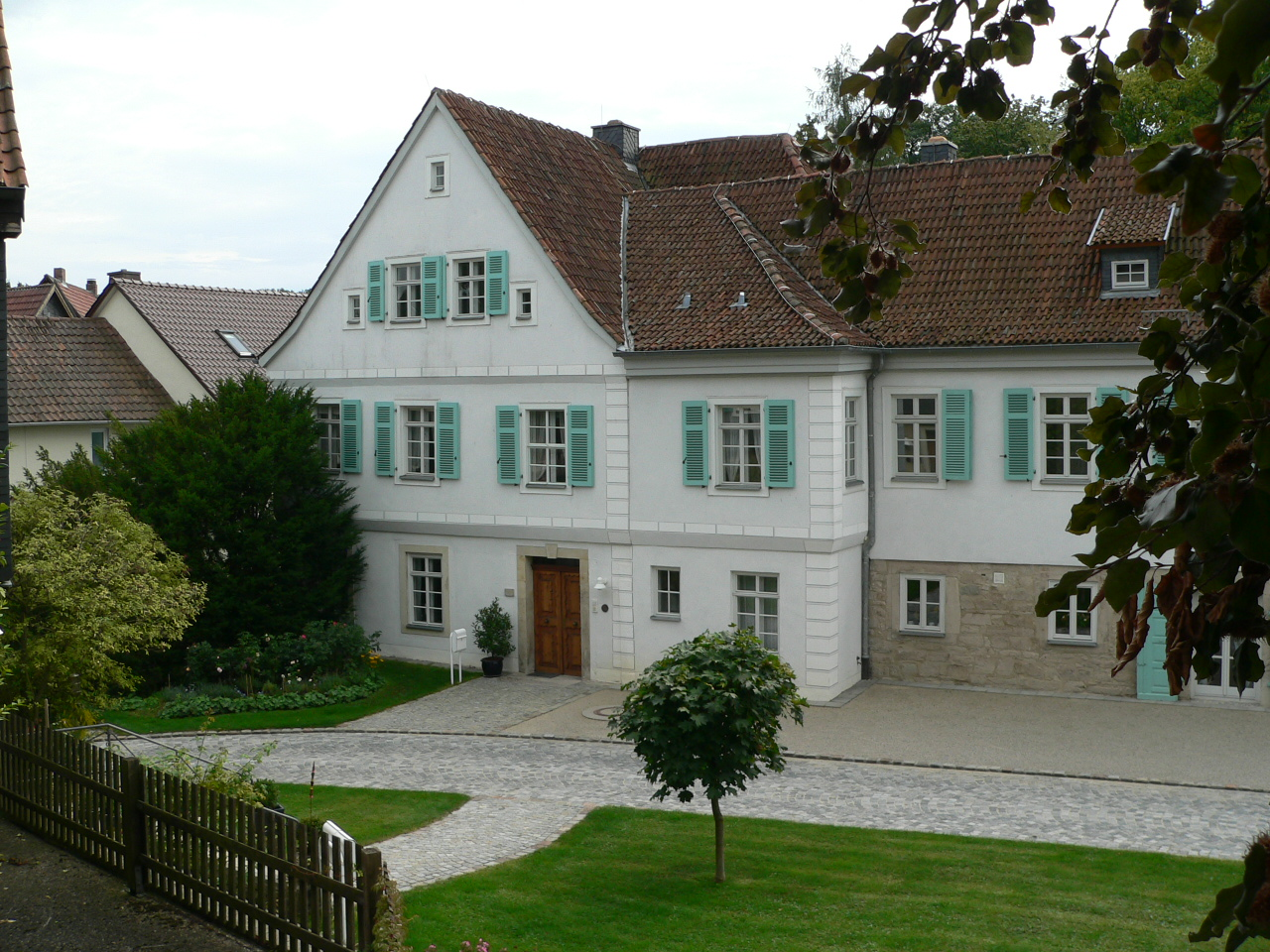 Wohnhaus Friedrich Rückerts in Coburg-Neuses, heute Rückert-Museum